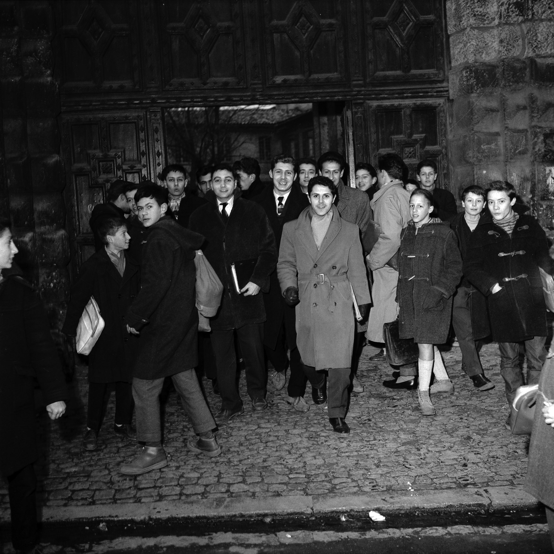 Lycée Pierre de Fermat. Le 19 Décembre 1957. Vue de l'arrière du Stade Toulousain, Pierre Chauderon, bien entouré par ses condisciples à la sortie du lycée Pierre de Fermat. Parmi eux de nombreux espoirs du rugby scolaire. Observation: Photo publié sur Miroir-Sprint N°604 du 30 décembre 1957.